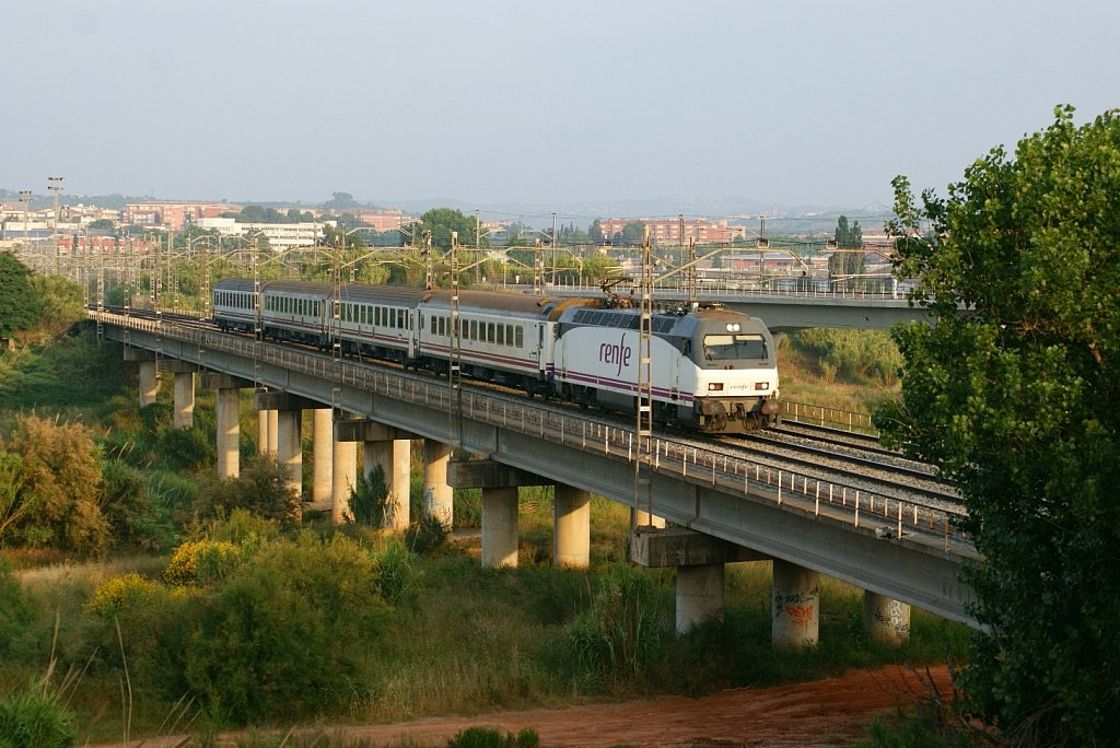 Un dels objectius d'aquell matí, era immortalitzar el desviament del Costa Brava per la línia de Vilafranca. A la foto la 252.044 amb el Costa Brava, travessant el pont sobre el riu Llobregat a Martorell. Foto dedicada a Martí i Ferran.